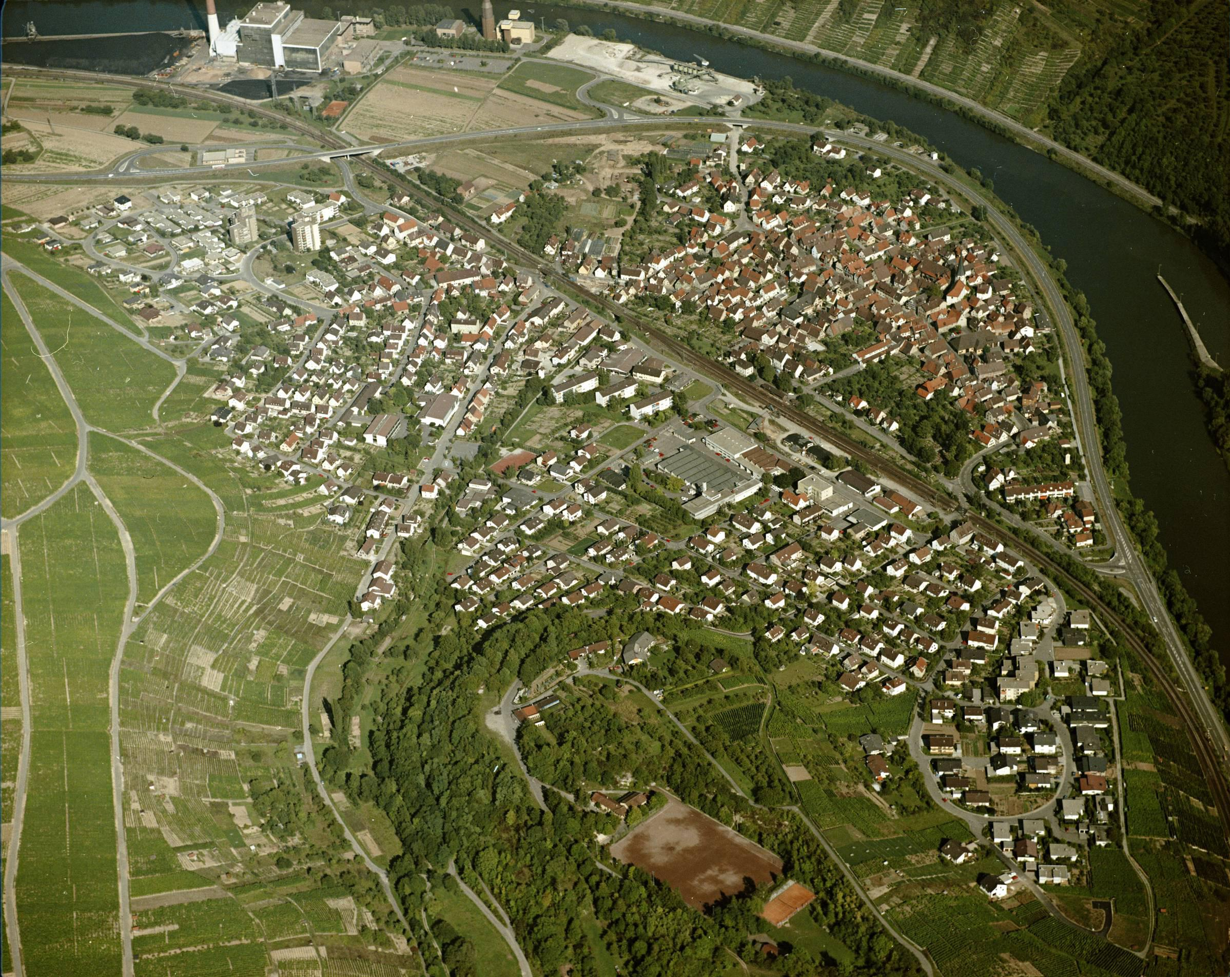 Luftbild von Walheim - Staatsarchiv Sigmaringen - Archivalieneinheit N 1/96 T 1 Nr. 541